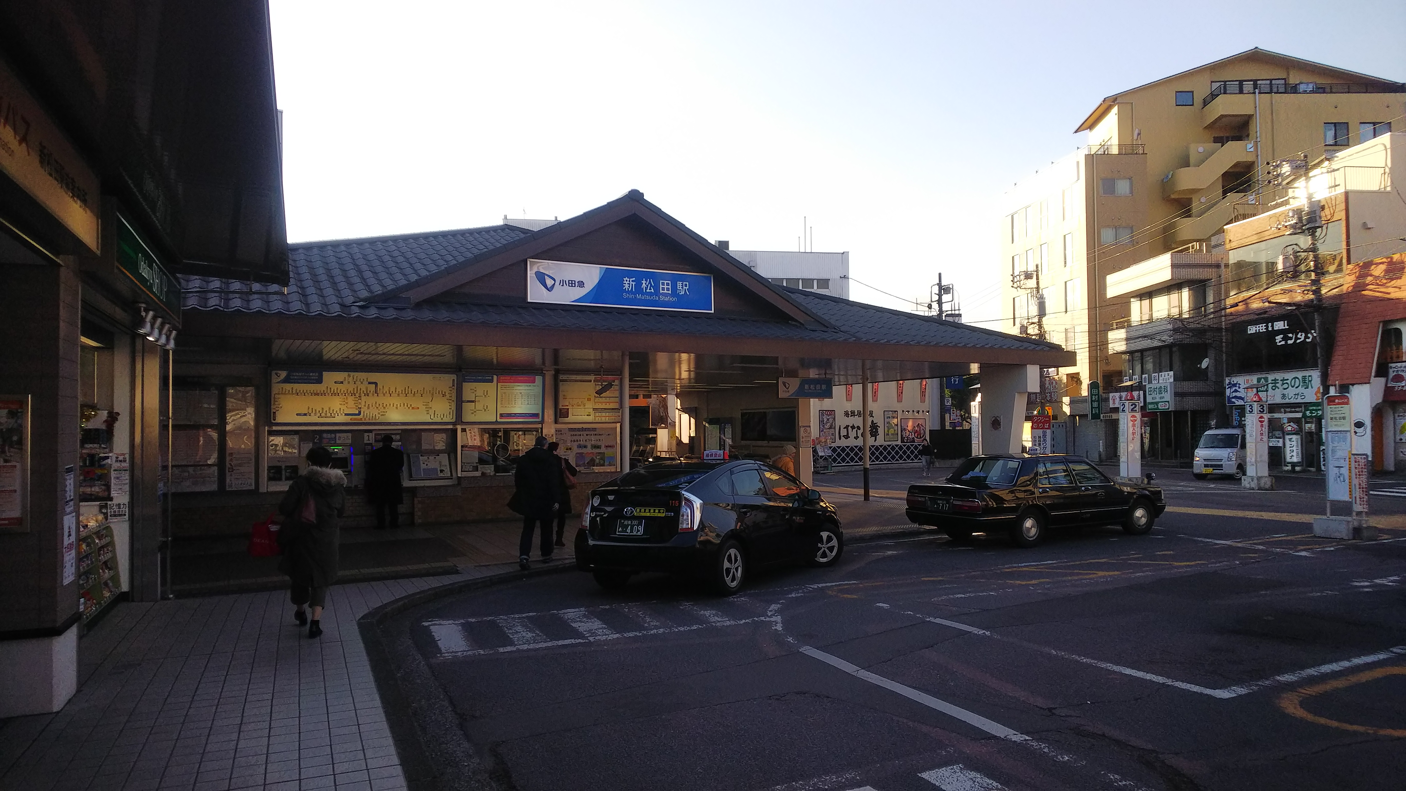 小田急新松田駅北口